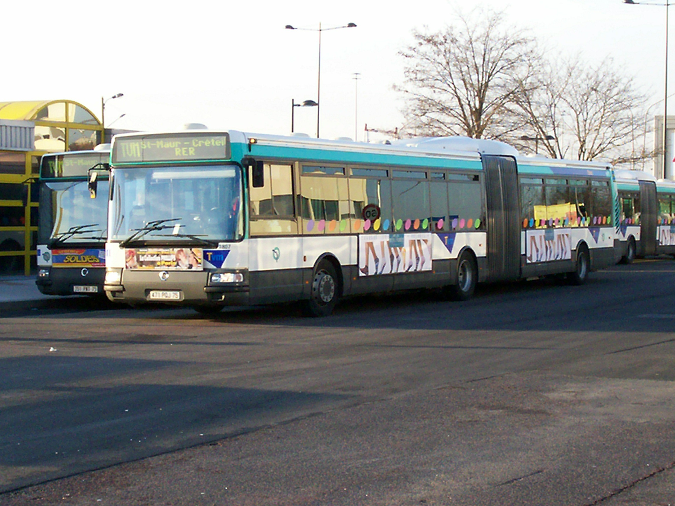 2 bus Tvm au terminus Rungis MIN